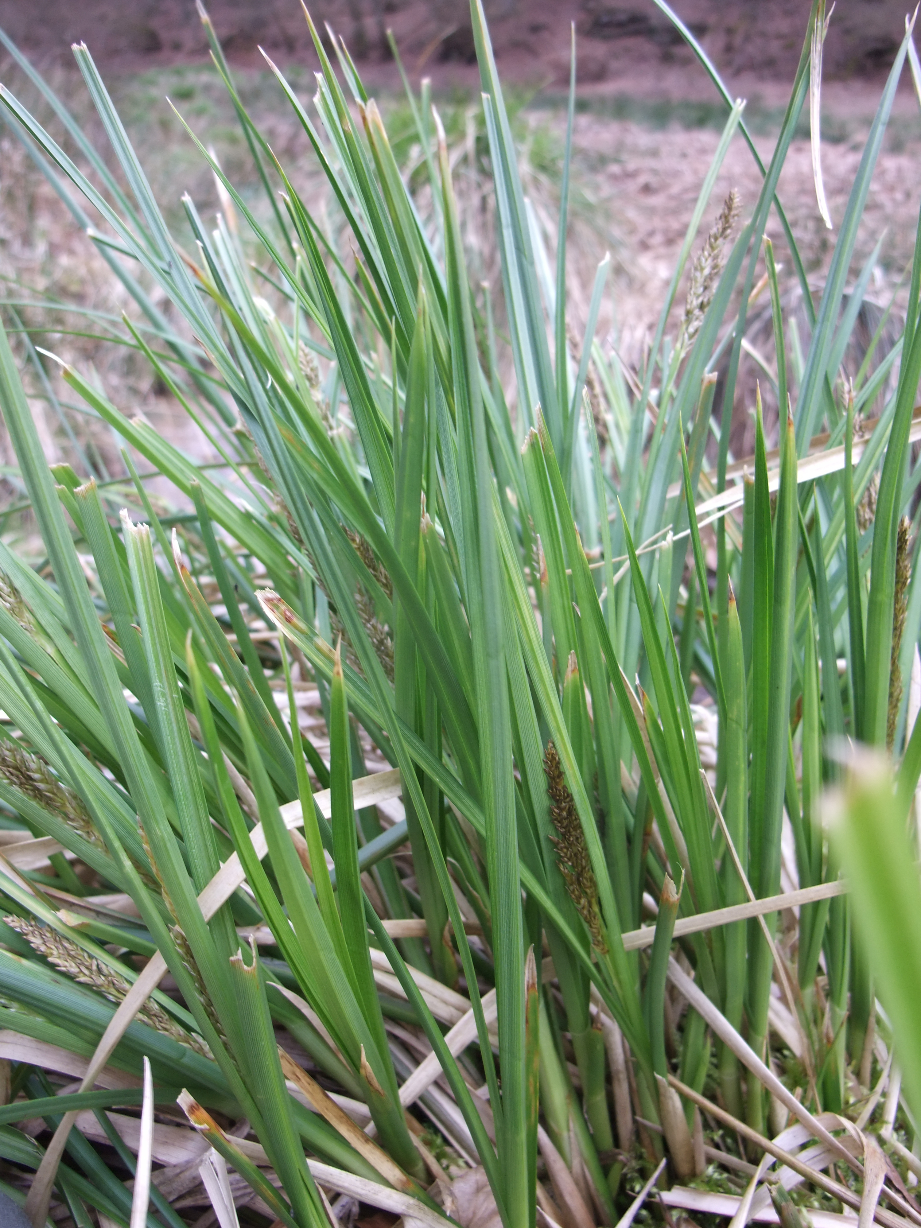 Carex paniculata